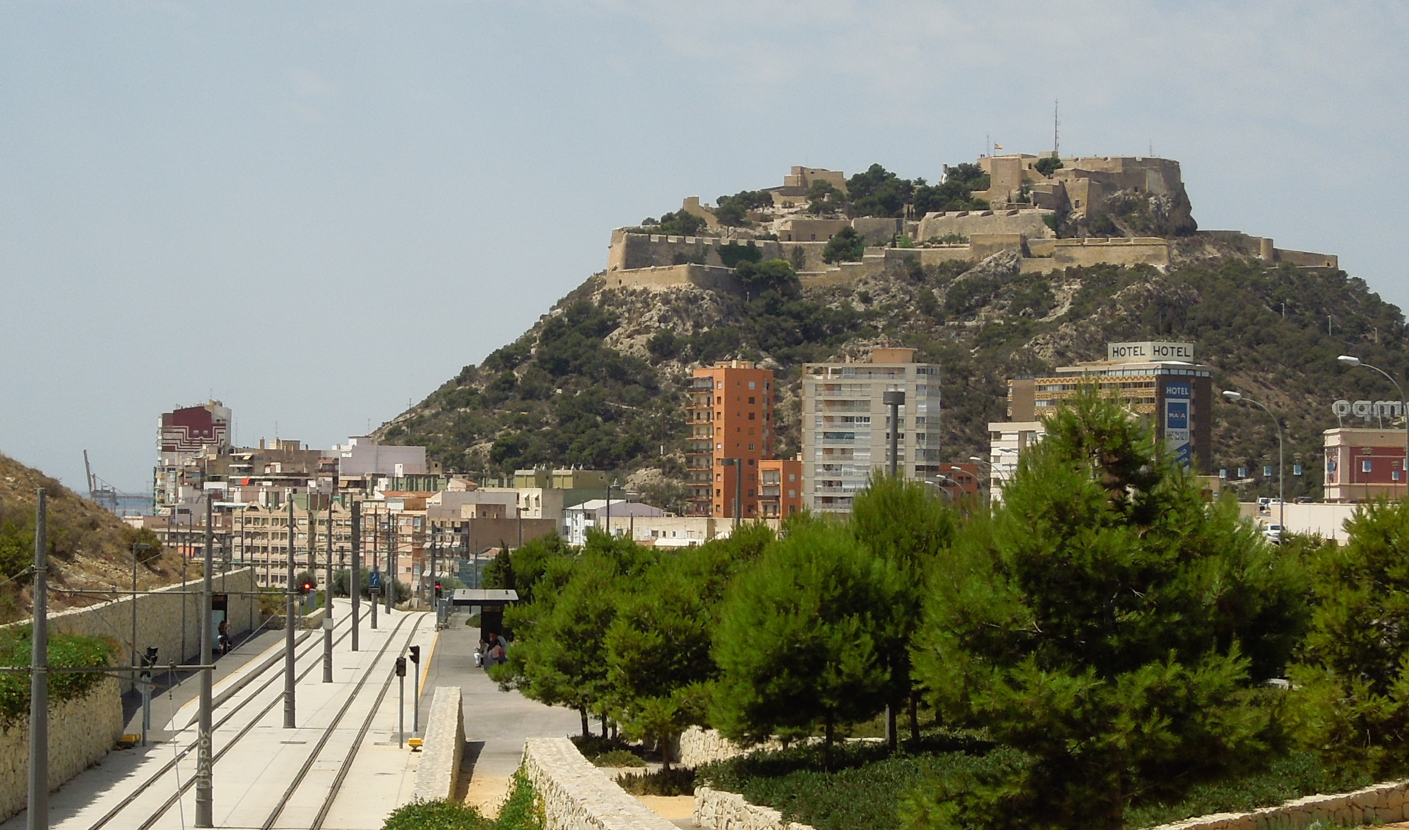 Primera parada tras la bifurcación de la L2